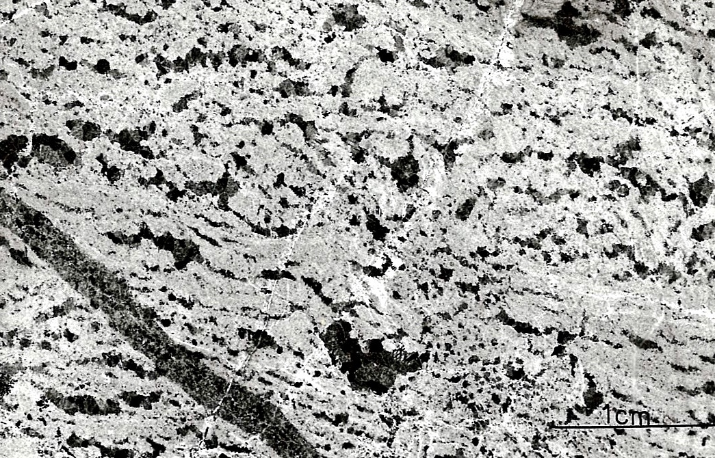 Folienabzug eines Kalksteins (Elbingeröder Komplex, Harz), Lagunenfazies (Dismikrit)